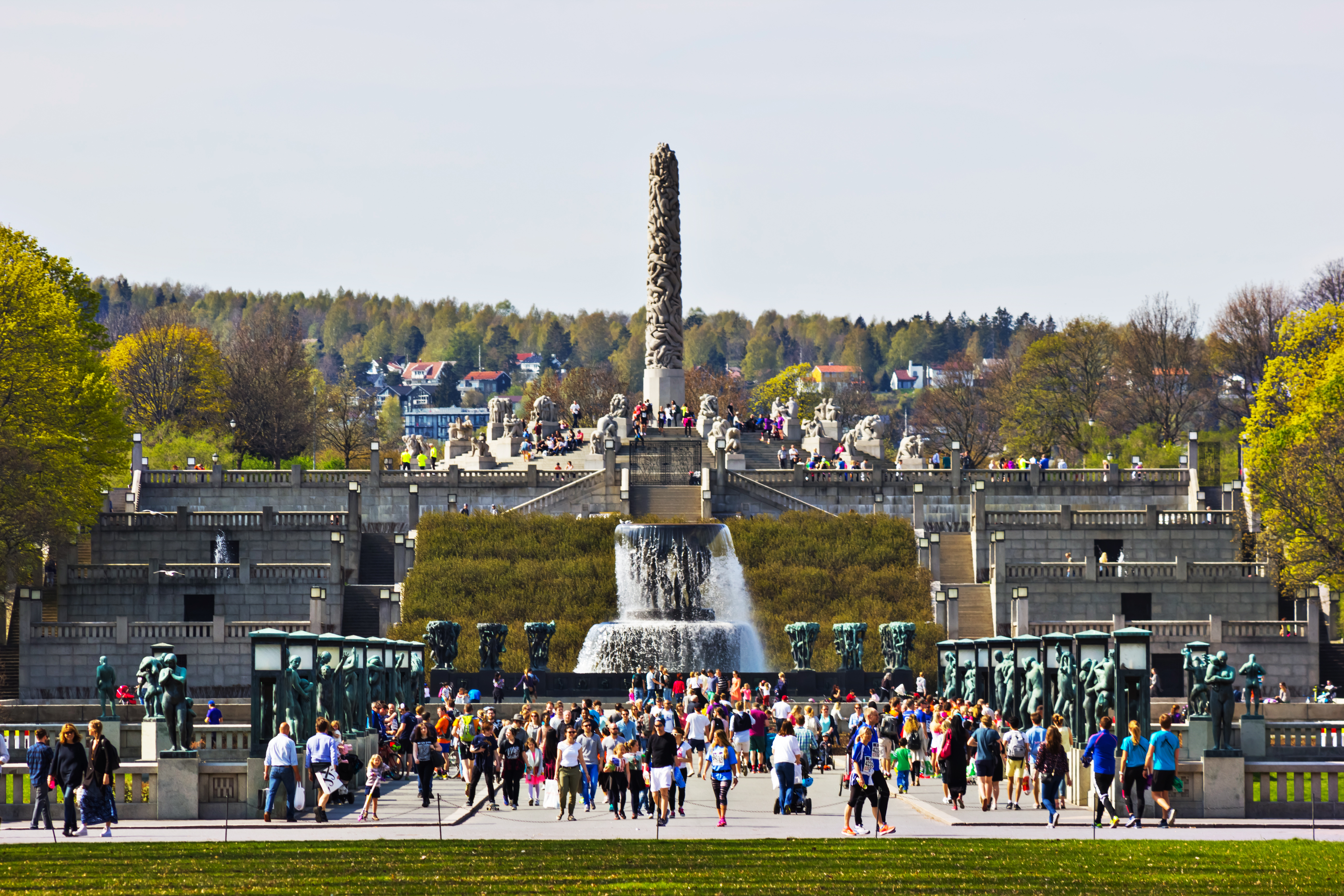 Parque Frogner en Oslo.